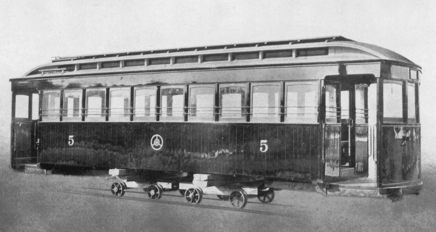 愛知電気鉄道 電1形の車体（日本車輛での製造過程。撮影時期の特定は『名古屋鉄道車両史 上巻』より）